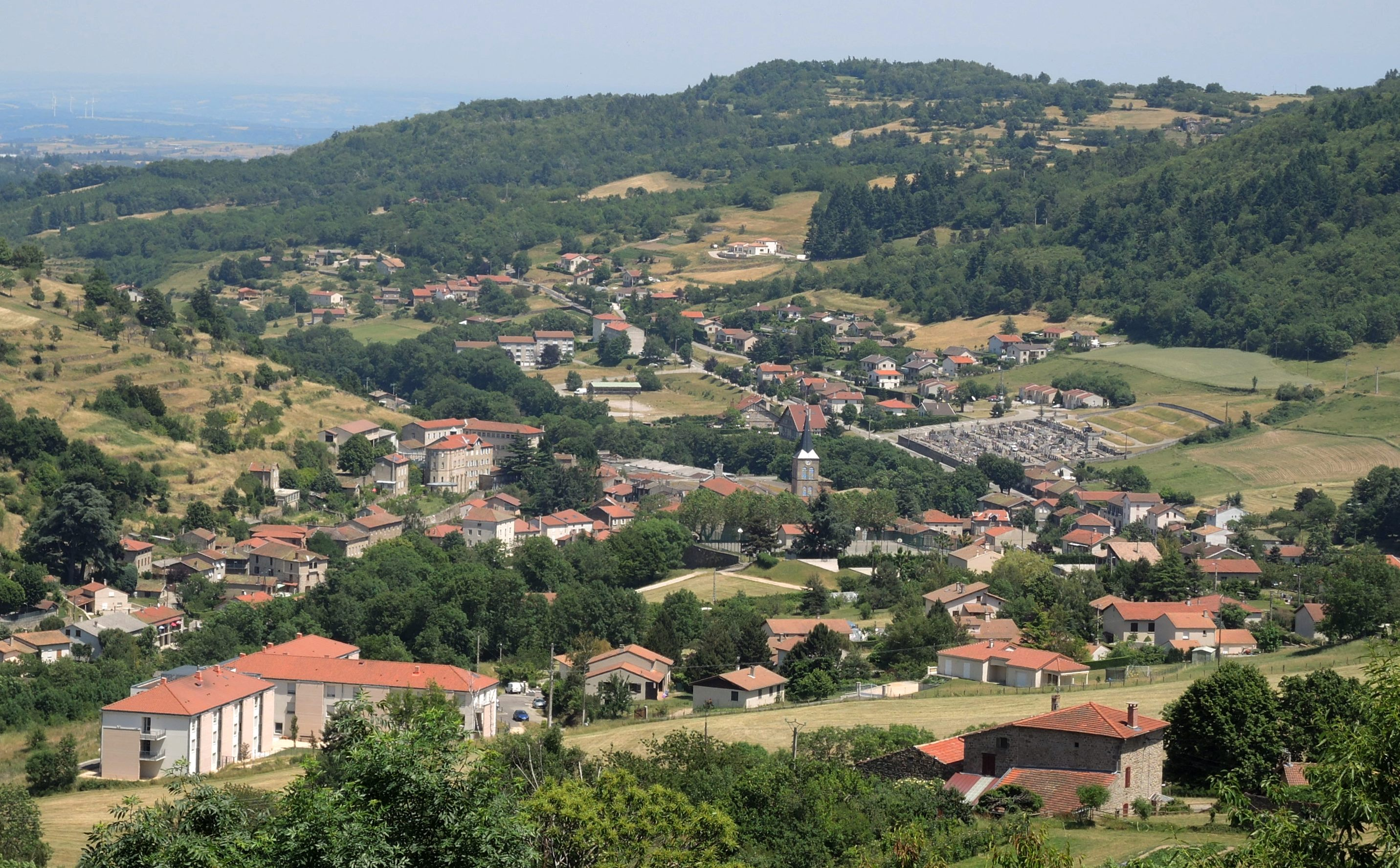 Satillieu vue générale Ouest